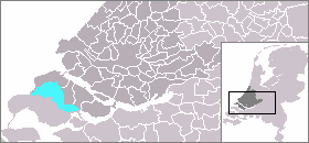 Kaart van de Grevelingen, gemaakt uit sjabloon van Wikipedia-gebruiker Mtcv